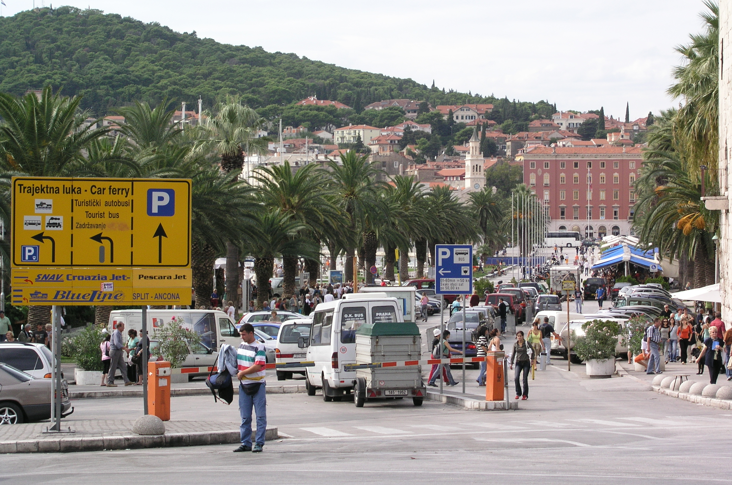 Split, Splitska riva, Croatia